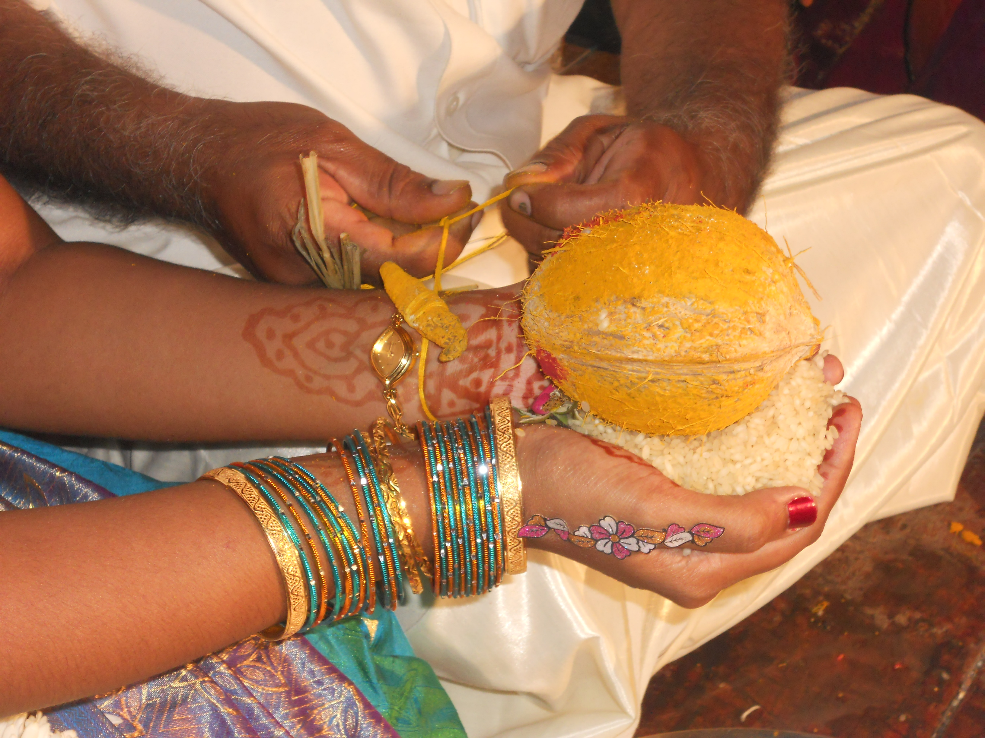 காப்புக்கட்டல்